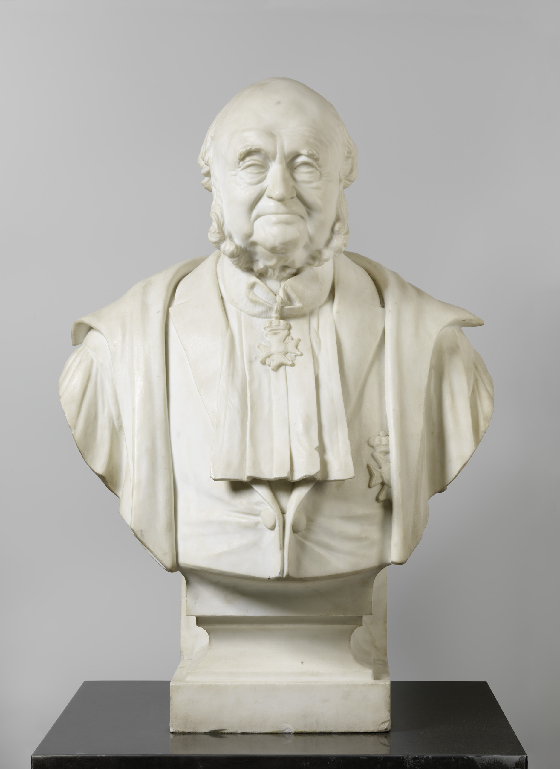 IdentificatieTitel(s): Buste van dr. Nicolaas Beets (1814-1903), letterkundigeObjecttype: buste Objectnummer: BK-B-77-1Opschriften / Merken: signatuur: ‘C. Beets 1894’inscriptie, tegen de onderzijde van de buste: ‘Nicolaas Beets // Poëta // Pastor // Professor // Pater Perfectus // Nat: 13 Sept. 1814 ob’inscriptie, op voorzijde voetstuk: ‘Nicolaas Beets’inscriptie, op achterzijde voetstuk: ‘Octogenarius’Omschrijving: Buste van dr. Nicolaas Beets (1814-1903), letterkundige. Gemerkt: C. Beets 1894.VervaardigingVervaardiger: beeldhouwer: Cornelis BeetsPlaats vervaardiging: NederlandDatering: 1894Fysieke kenmerken: marmerMateriaal: marmer Afmetingen: h 88 cm. × b 56 cm. × d 36 cm. buste: g 175 kgOnderwerpWat: portrait of a writerhistorical persons (+ (full) bust portrait)Wanneer: 1830 - 1900Wie: Nicolaas BeetsVerwerving en rechtenCredit line: Schenking van M. Crommelin, UtrechtVerwerving: schenking mei-1898Copyright: Publiek domein